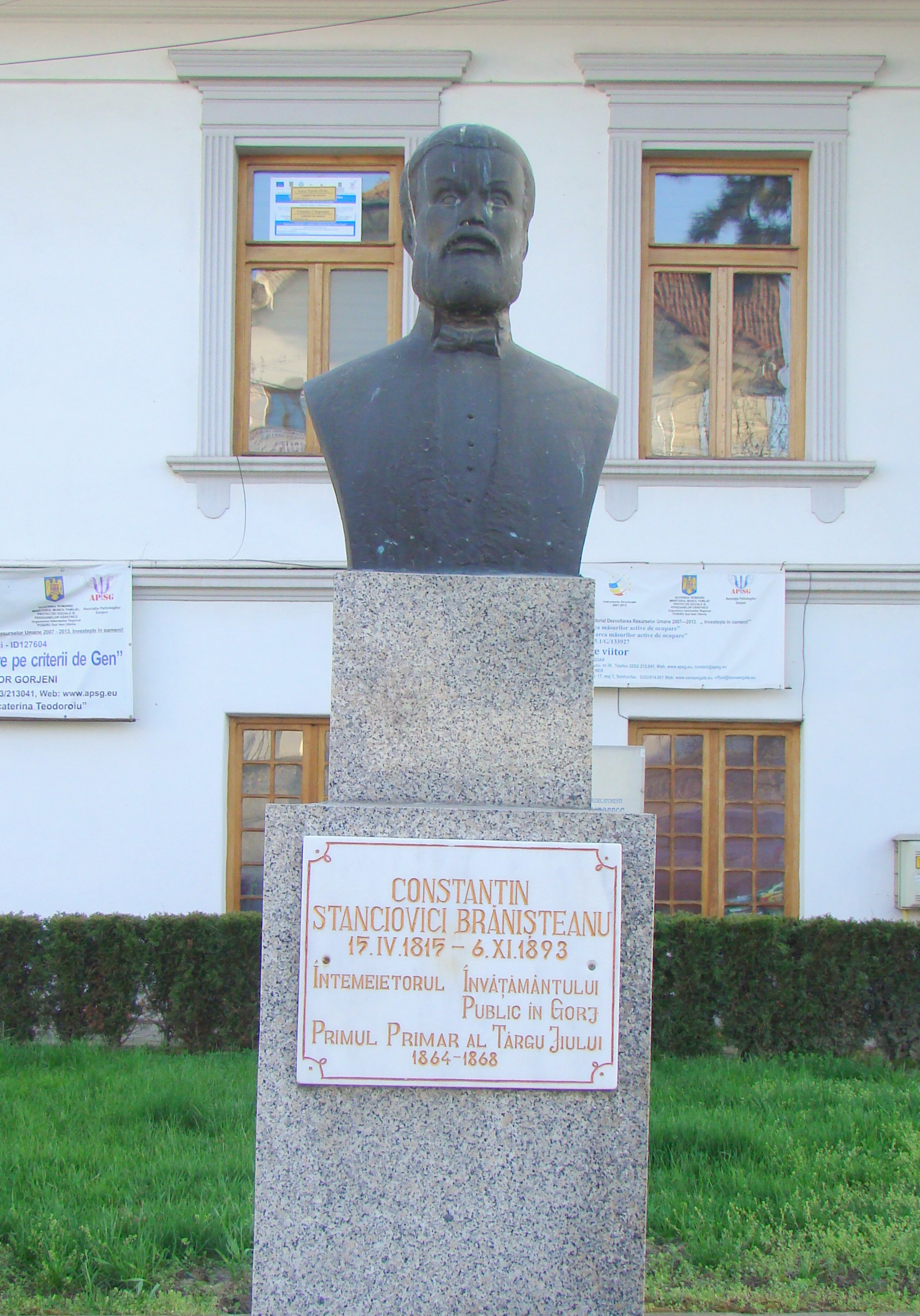 Bustul lui Constantin Stanciovici Brănişteanu din Târgu Jiu